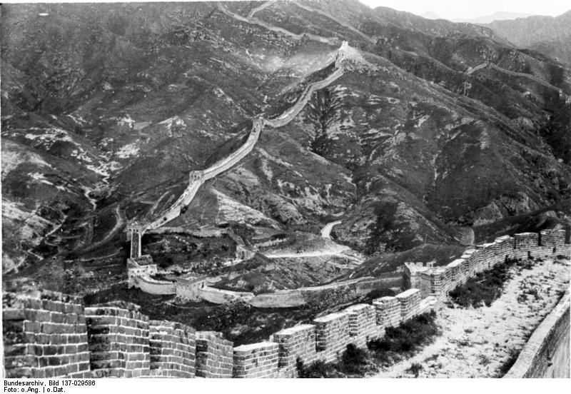 Nordchina, Prov. Chihli, Nan Kau Paß bei Peking mit Großer Mauer